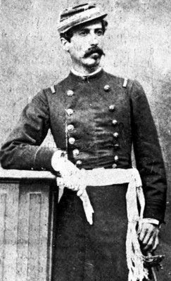 Capitán Ramón Dardignac (1849-1881) Capitán Ramón Dardignac (1849-1881) Sargento Mayor y 2º Comandante del Batallón Caupolicán, ofrendó su vida heroicamente en la sangrienta batalla de Miraflores